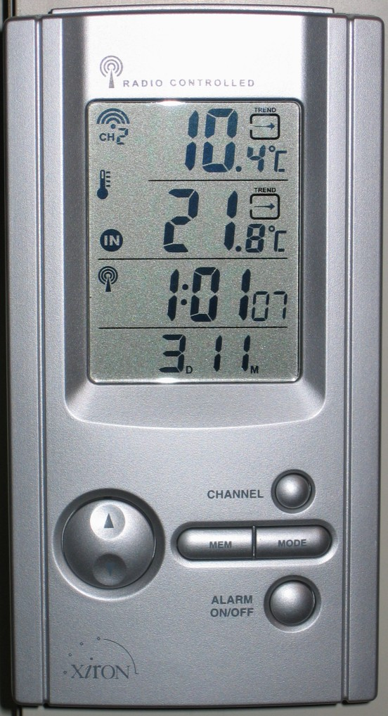 Eigen foto van een draadloze thermometer